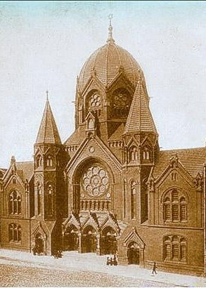 Cинaгoга Кёнигсберга